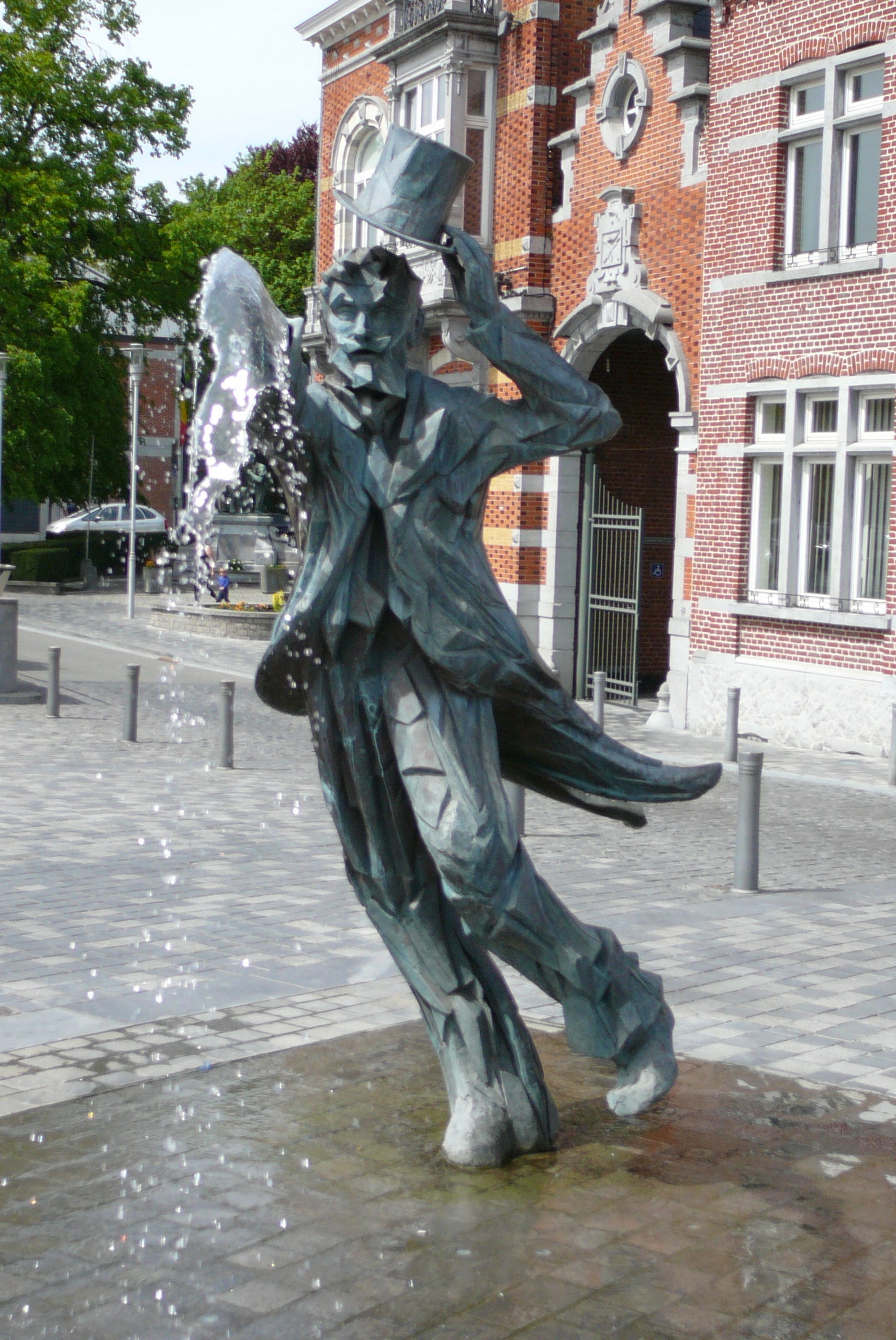 Statue-fontaine de Simpélourd sur la Place Verte à Soignies.